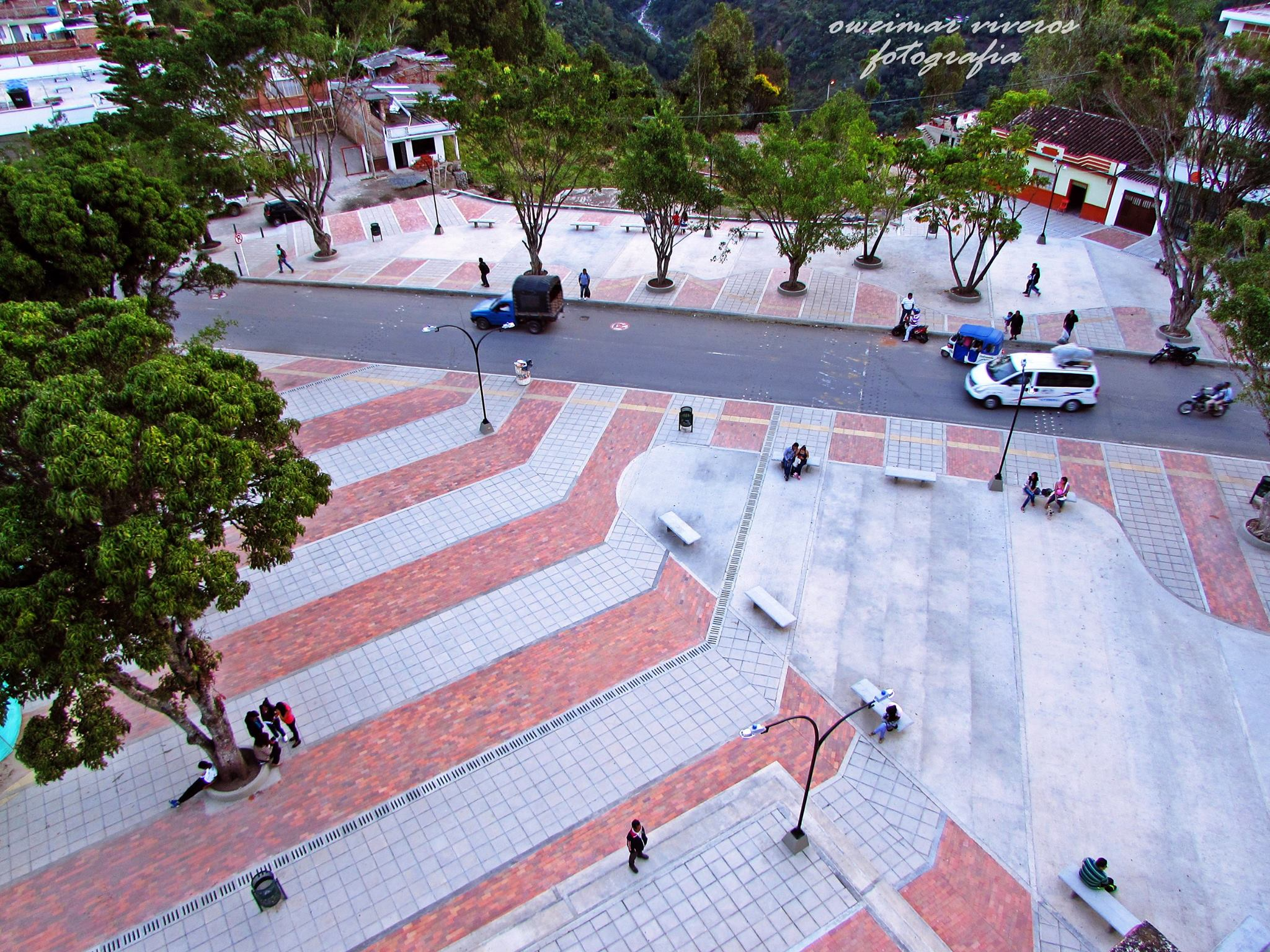 Parque central del Municipio de Buesaco - Nariño